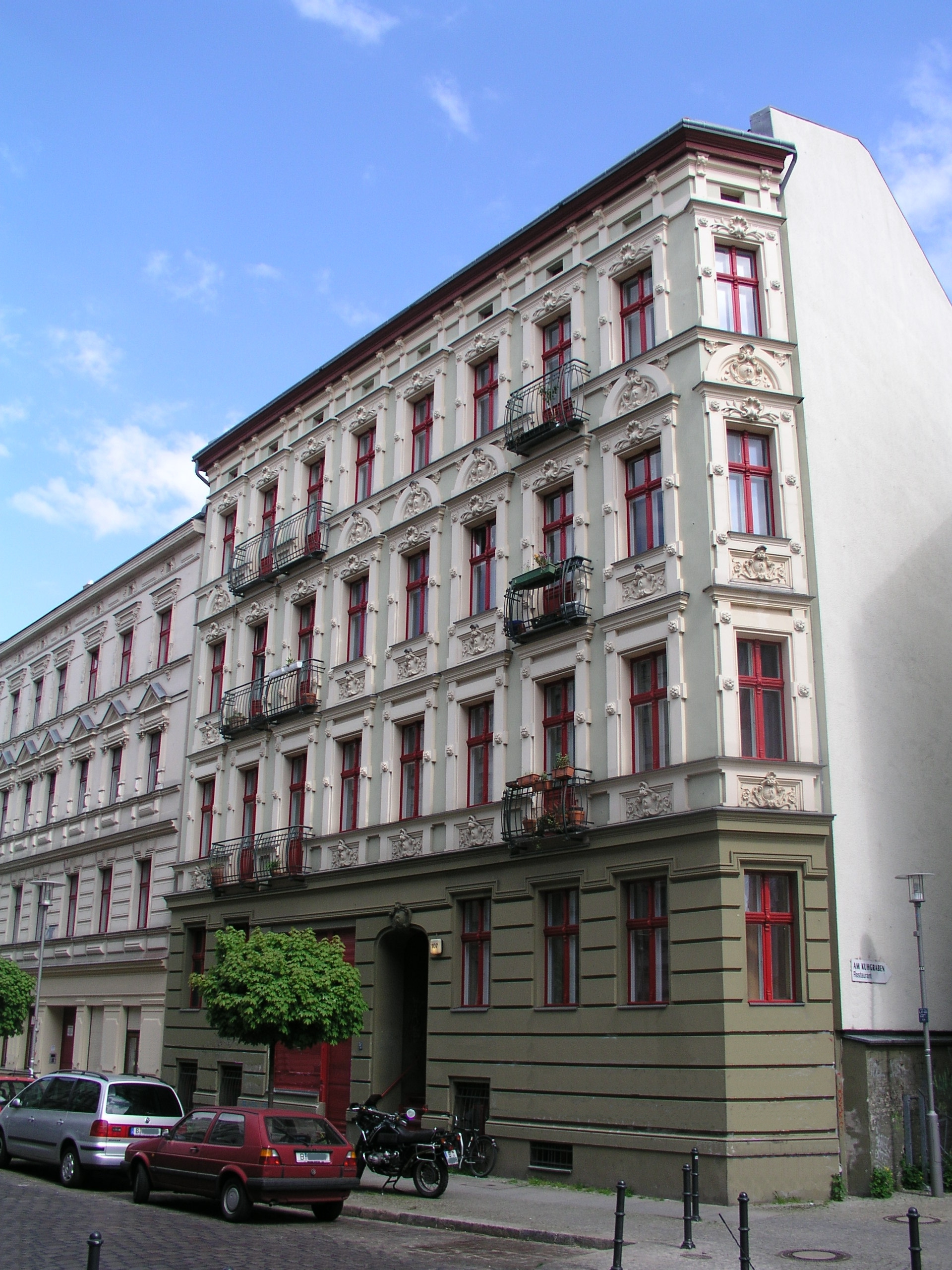 Renoviertes typisches "Gründerzeit-Haus" in der Victoriastadt (Pfarrstraße)